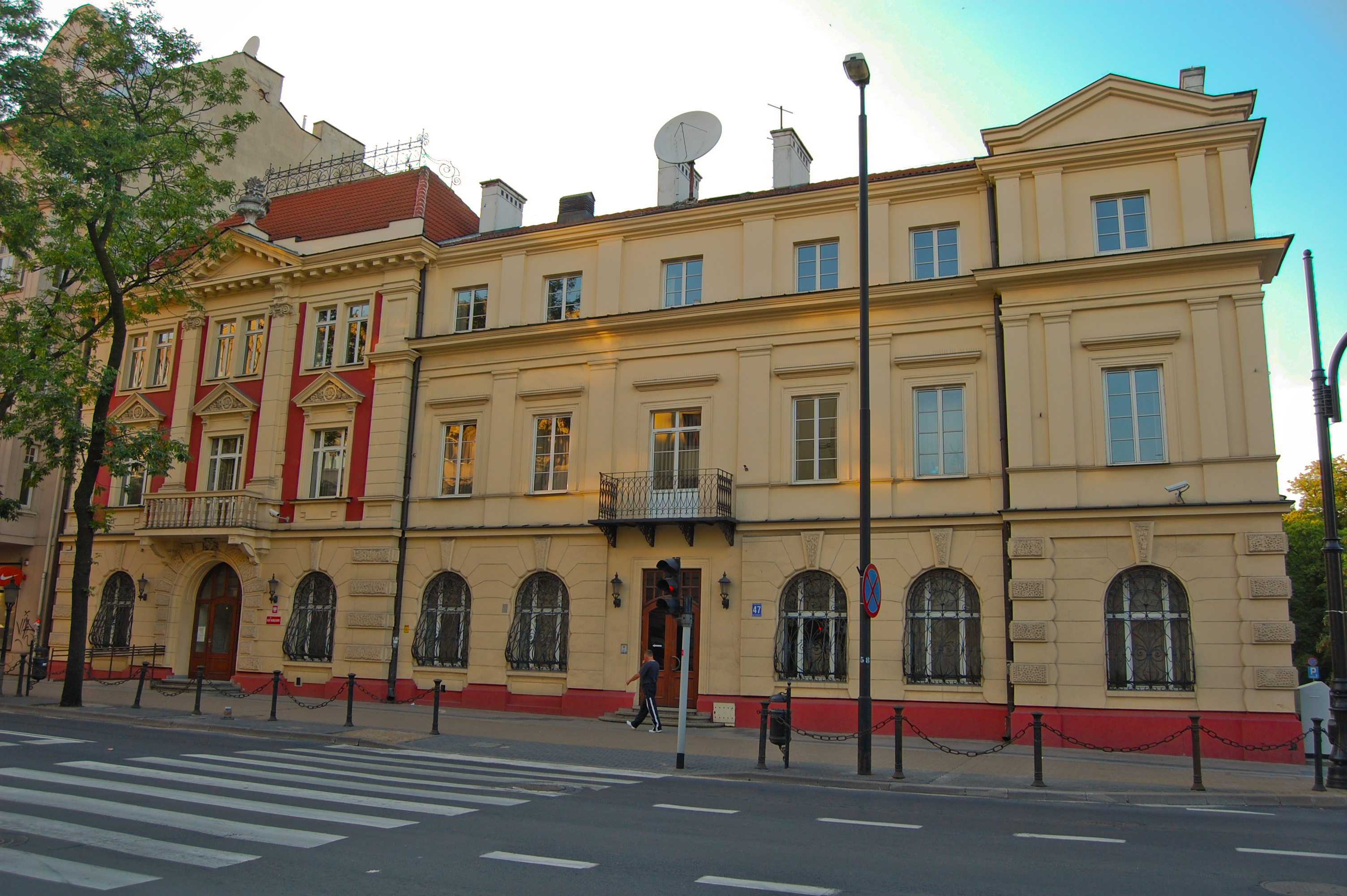 Lublin, Krakowskie Przedmieście 47, Sąd Okręgowy